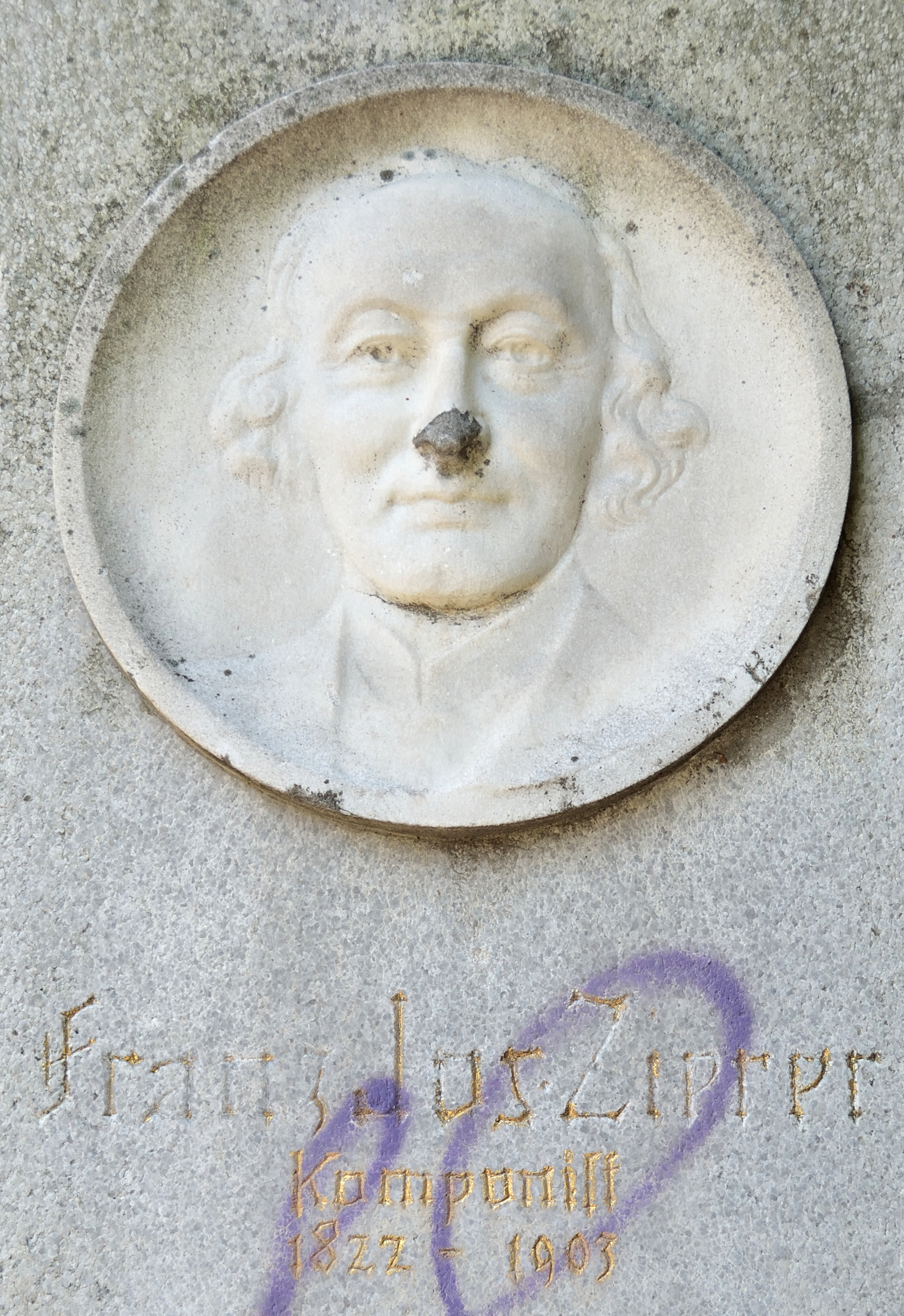 Meidlinger Künstler-Gedenkstein von Fritz Hänlein, 1926, im Theresienbadpark. Obelisk auf Vierkantsockel mit den Portraitmedaillons von Anton Hlavaček, Fritz Stüber-Gunther, Oskar Pach und Franz Josef Zierer.